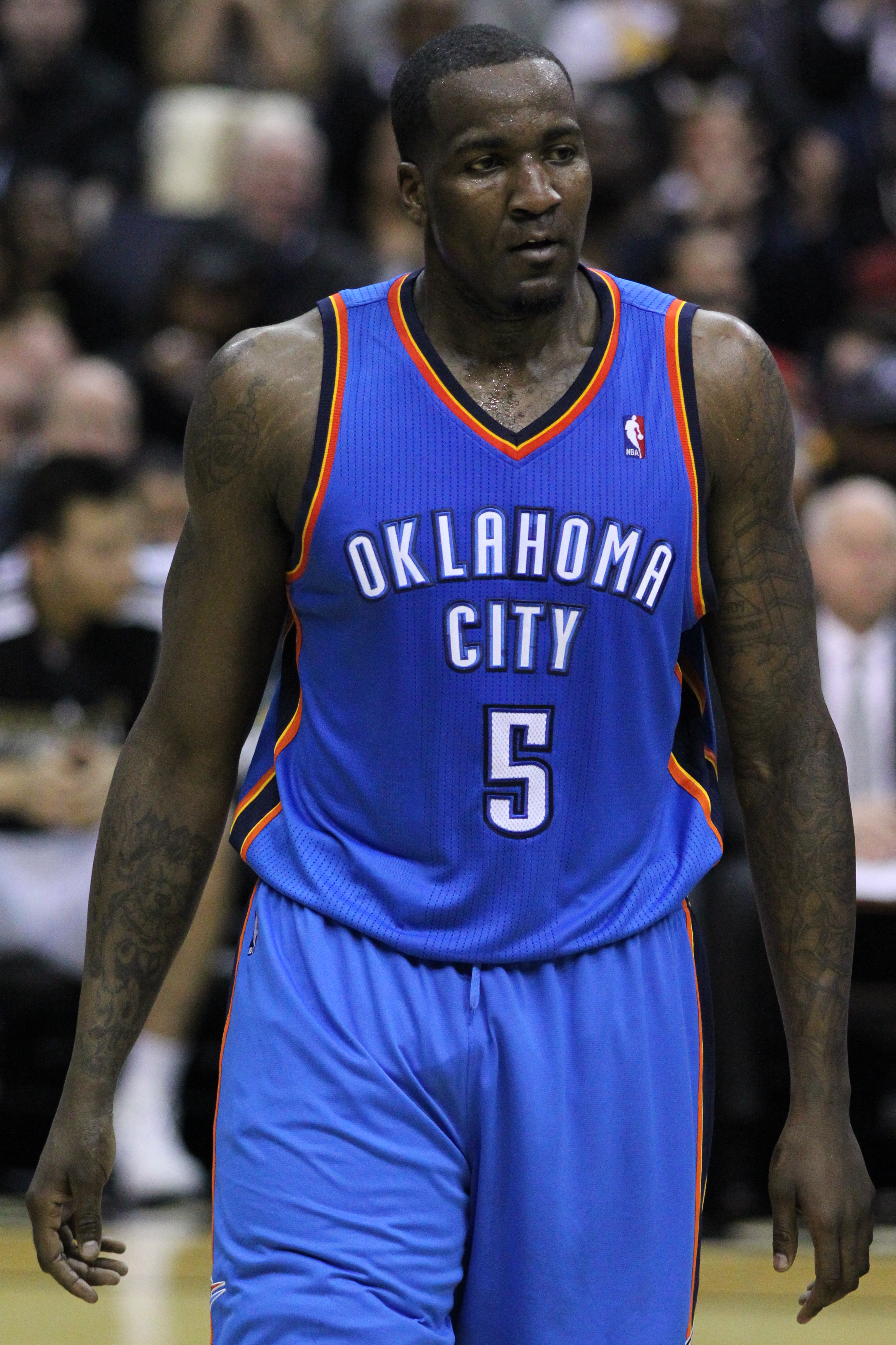 Wizards v/s Thunder 03/14/11